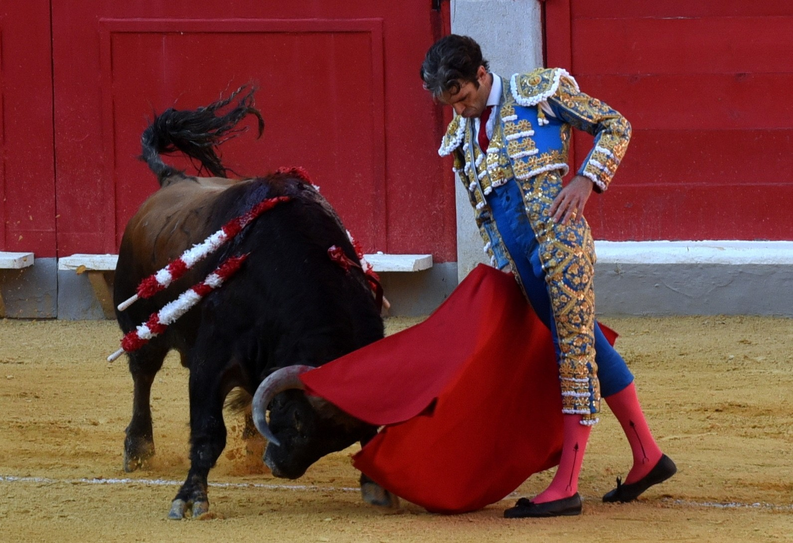 Trincherazo cargando la suerte de forma clásica, relajado, templado y mandón.